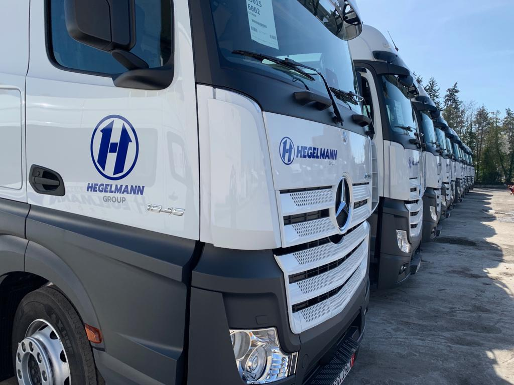 Hegelmann Flotte